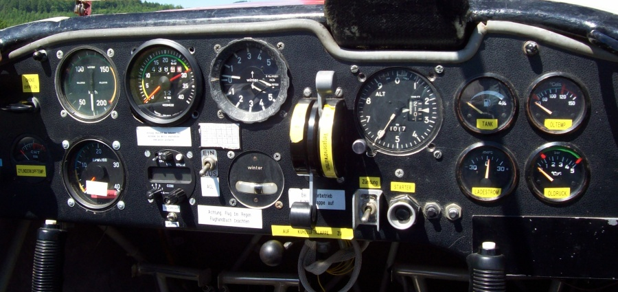 Cockpit Motorsegler SF25C